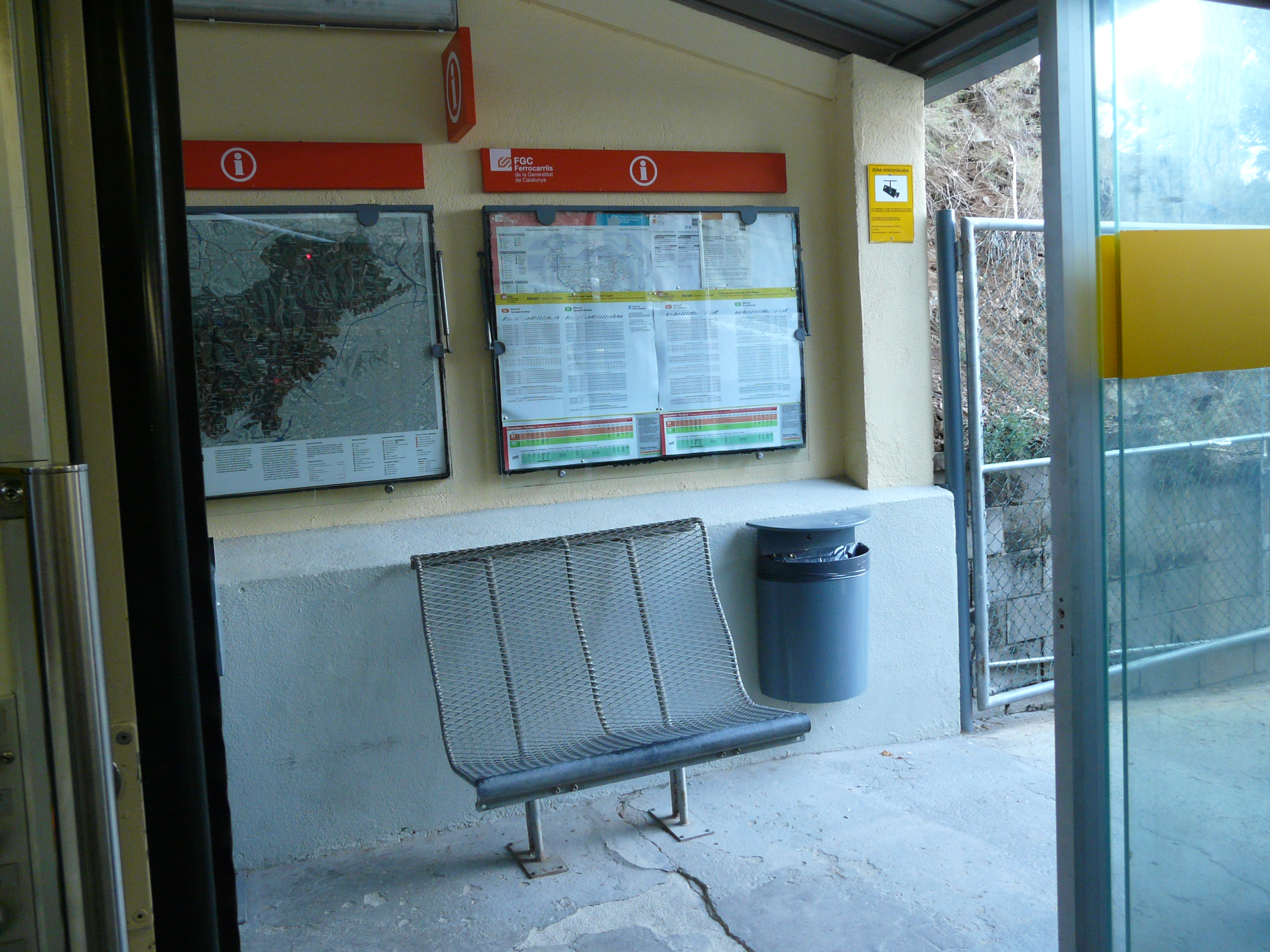 Estació de Carretera de les Aigües del funicular de Vallvidrera. Imatges preses des de l'interior del funicular.